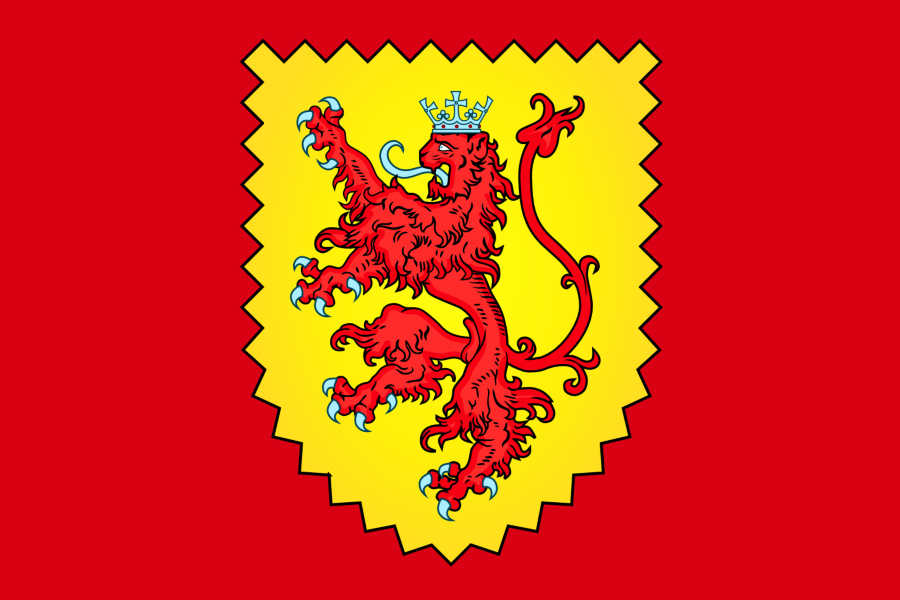 Flag of Kilikia - Cilicia